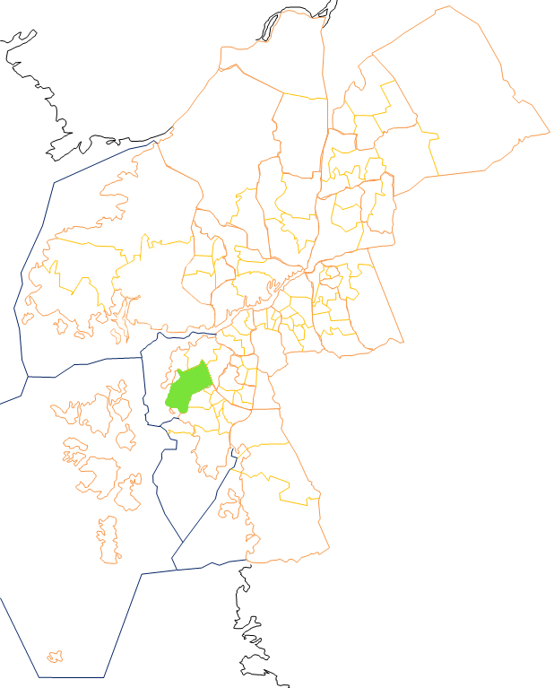 Karta som visar primärområdes belägenhet i Göteborg